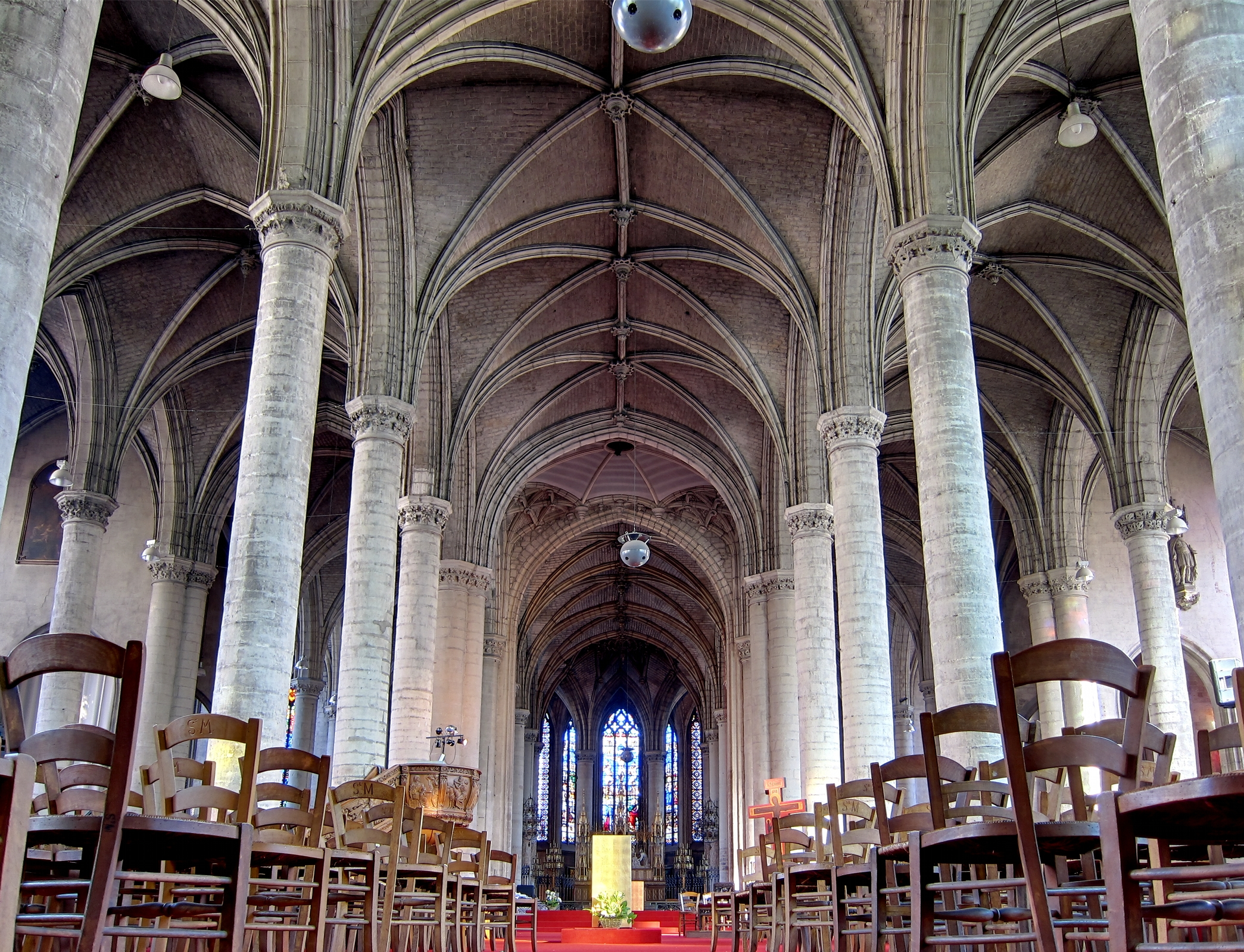 La nef de l'église Saint-Maurice de Lille (Nord).